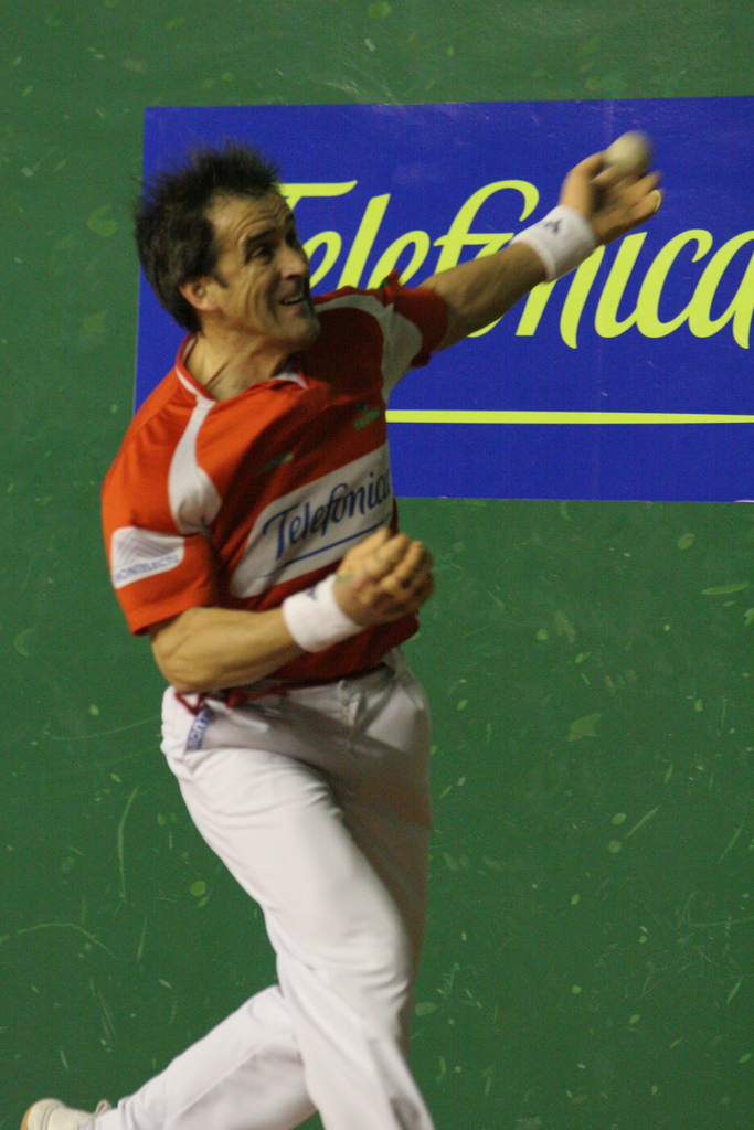 Fernando Arretxe pilotaria